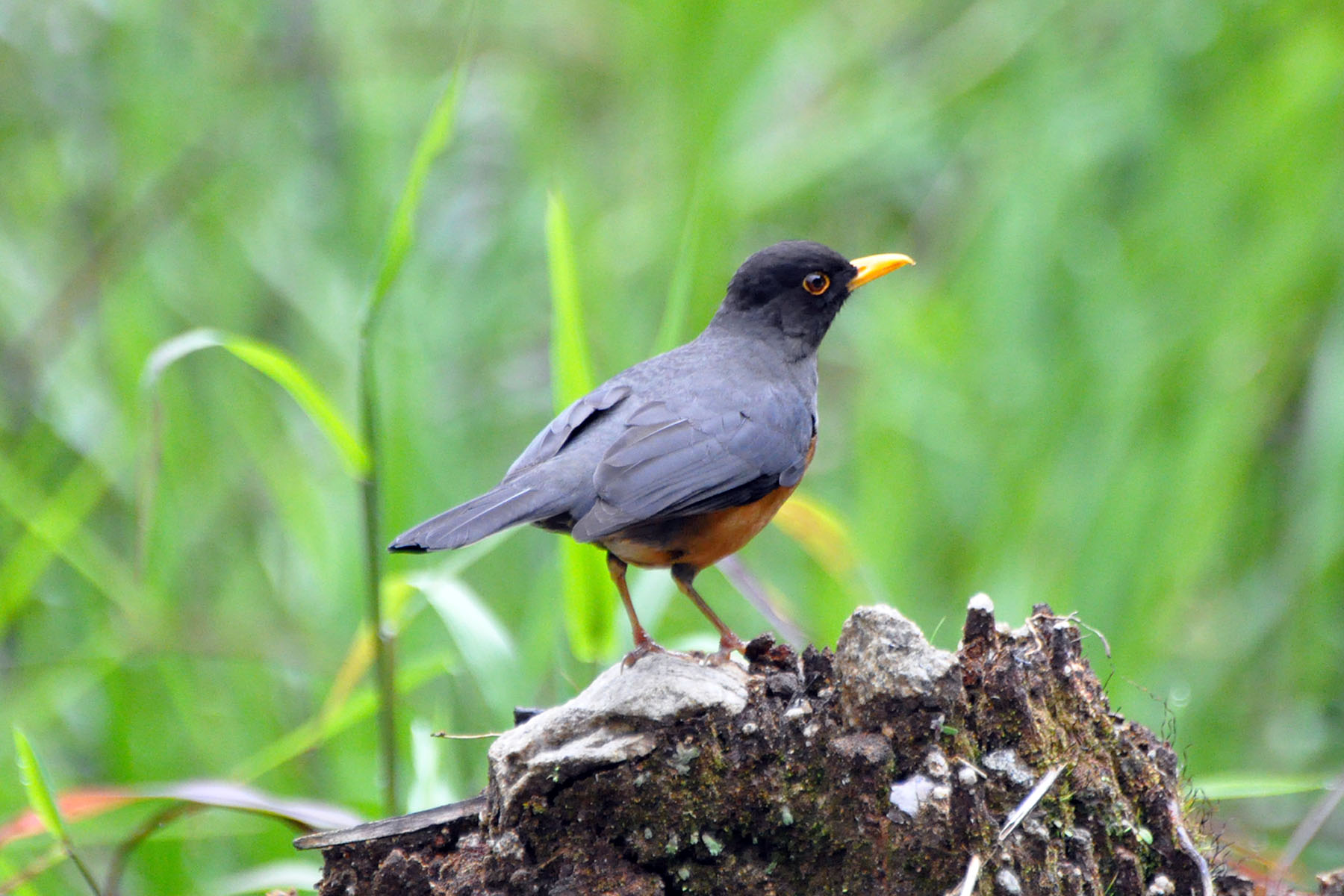 Turdus fulviventris 19-Sep-10 Guacamayos Ridge, Ecuador